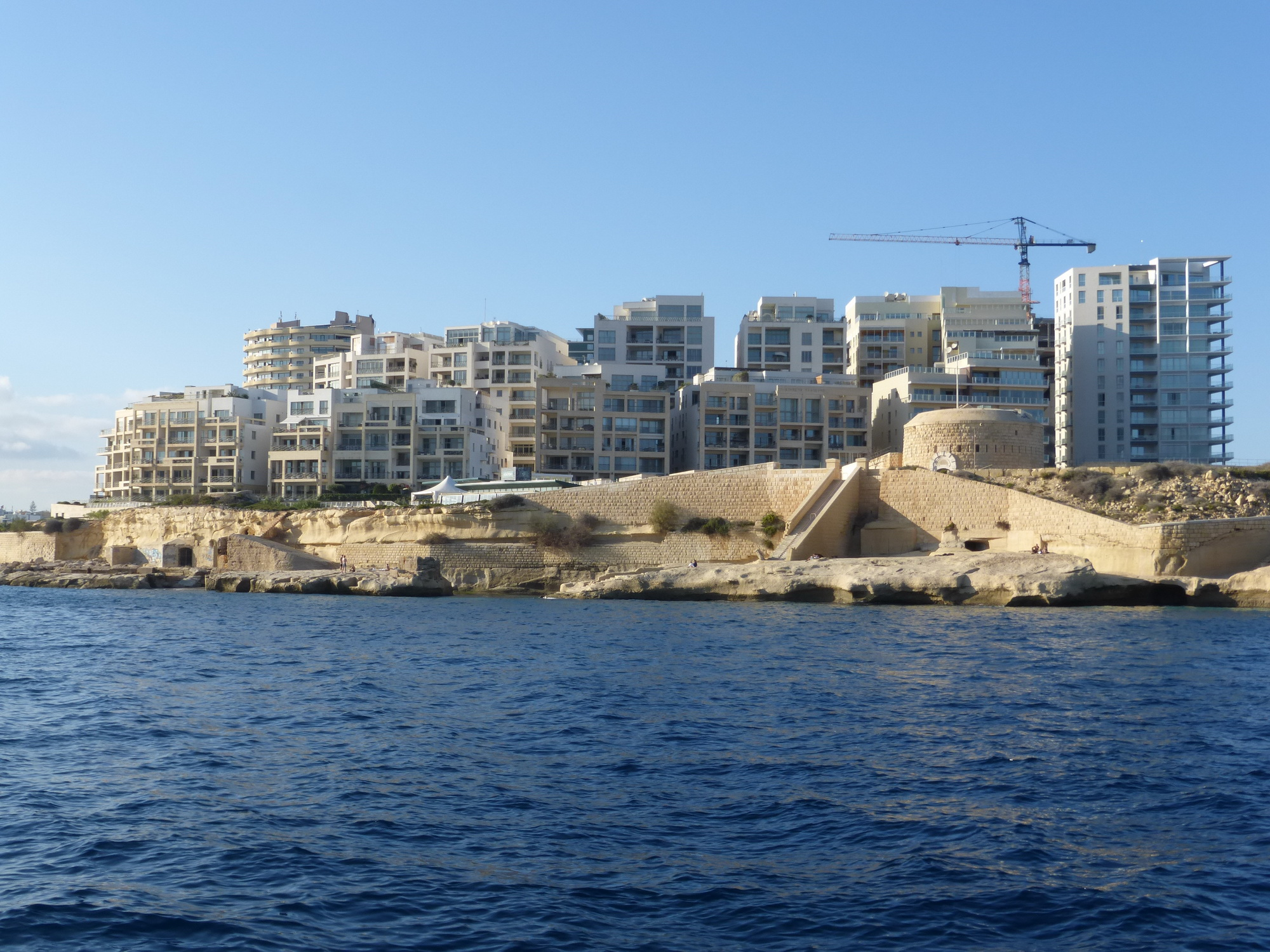 Skyline von Sliema mit Fort Tigné im Vordergrund (Malta)